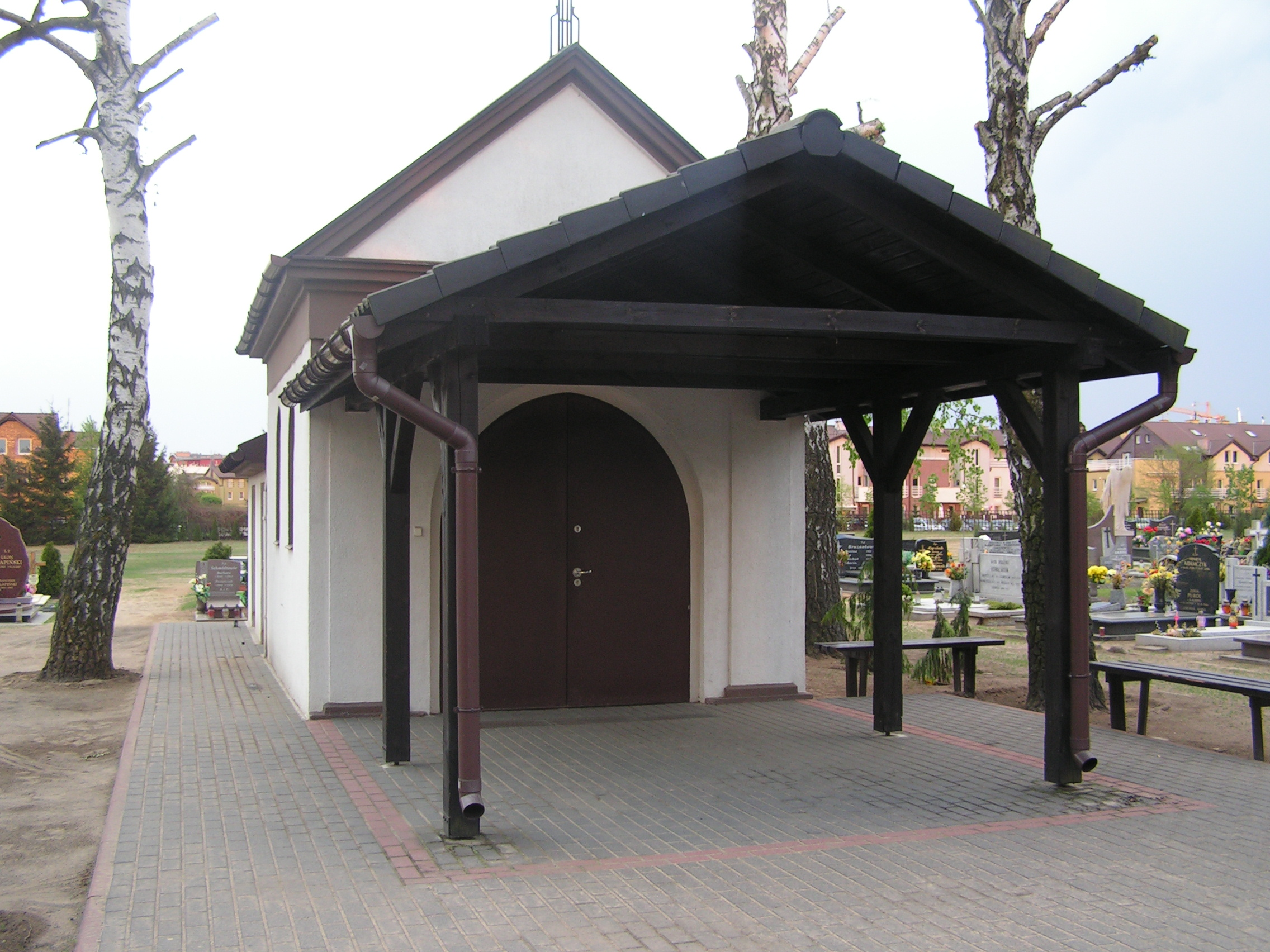 plac przed kaplicą